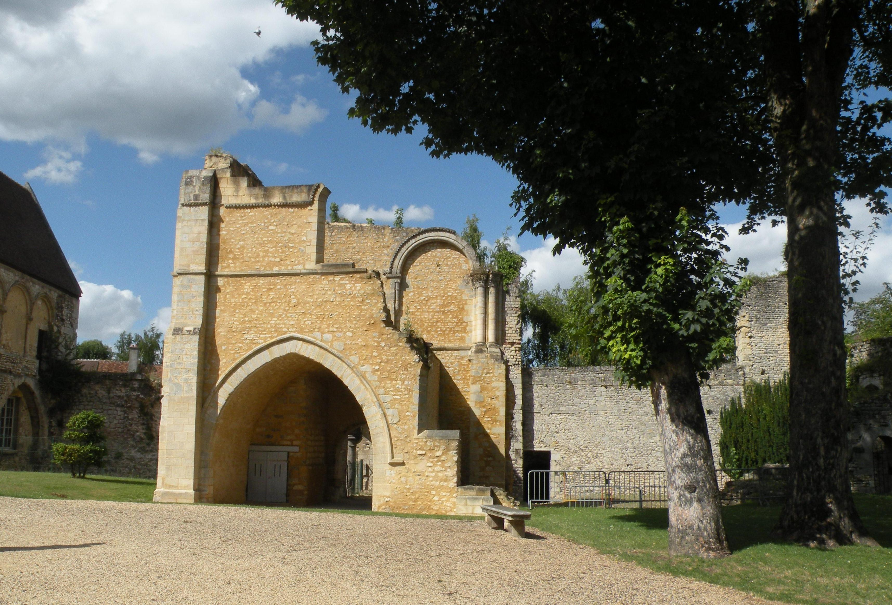 Château royal de Senlis (Oise). Ce corps de bâtiment, plus grand qu'il ne paraît depuis ce côté (sud), contient les vestiges de différentes pièces. Au rez-de-chaussée, la grande voûte en arc brisé était l'accès aux appartements royaux. Au-dessus, subsiste la tribune occidentale de la chapelle royale Saint-Denis de 1142, démolie au XIXe siècle. La voûte plein cintre murée ouvrait sur la grande salle royale de l'étage, qui se trouvait derrière. Le rez-de-chaussée abritait les cuisines à gauche et le cellier à droite.